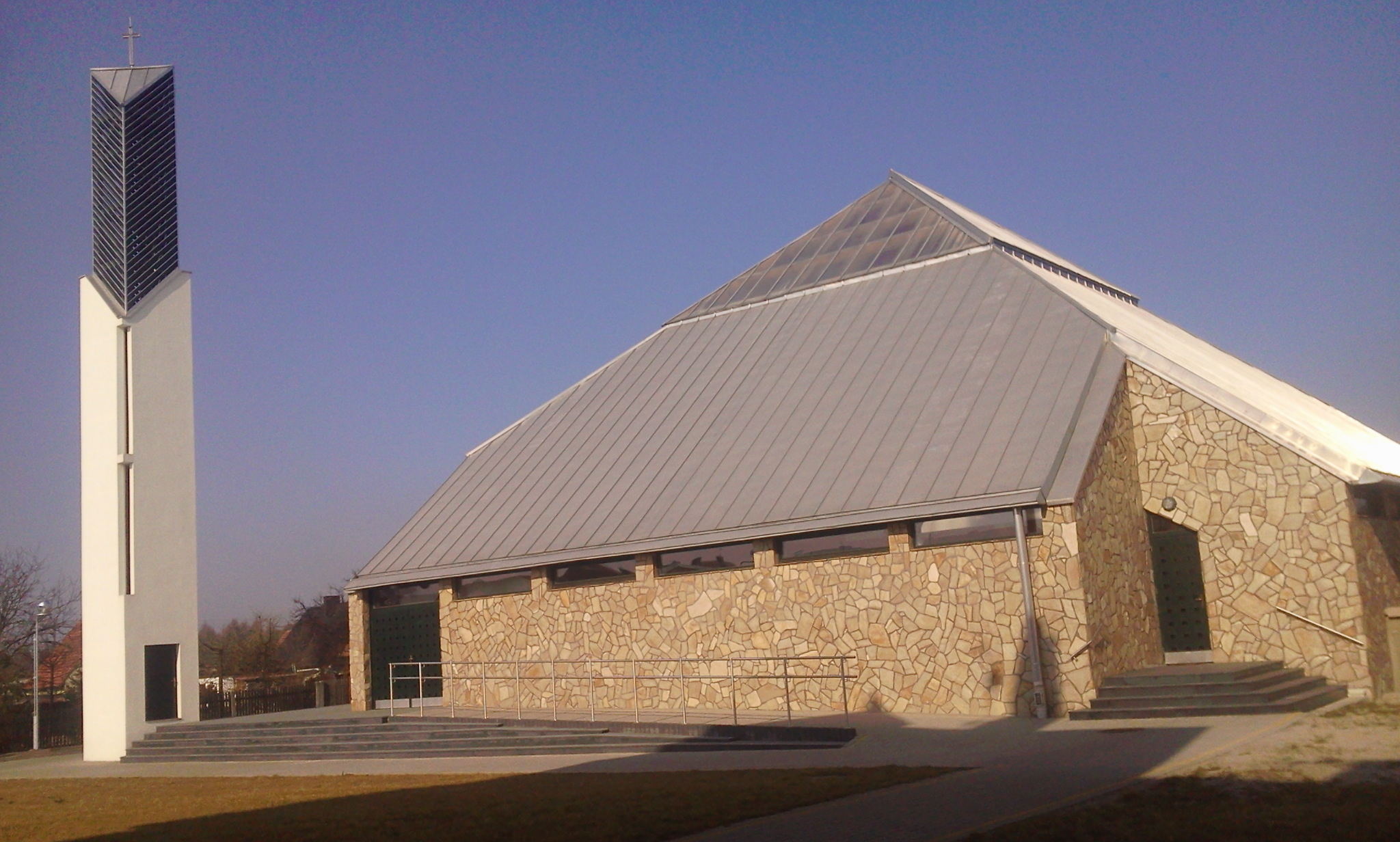 Zdjęcie kościoła parafialnego parafii św. Ojca Pio w Zdzieszowicach